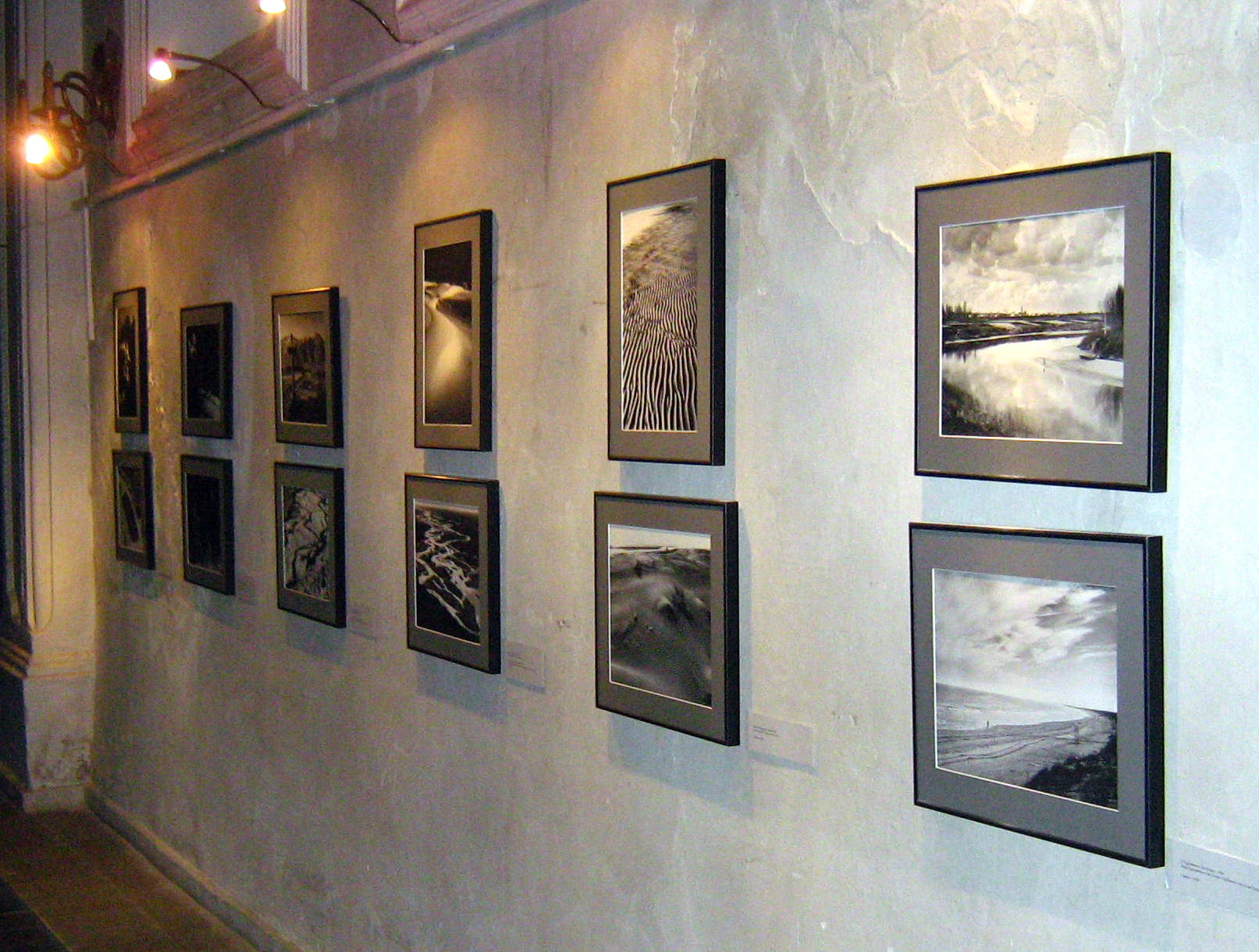 Wystawa fotograficzna Elio Ciol w Białej Synagodze w Sejnach.